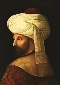 Muhtemelen Gentile Bellini tarafından ya da en azından atölyesinde yapılmış olan ikinci Fâtih portresi. Başın tuhaf bir biçimde sol omza dönük olması, bu resmin canlı bir modelle değil, Bellini'nin Venedik'e dönüşünden sonra yapılmış olabileceğini düşündürür.[1]